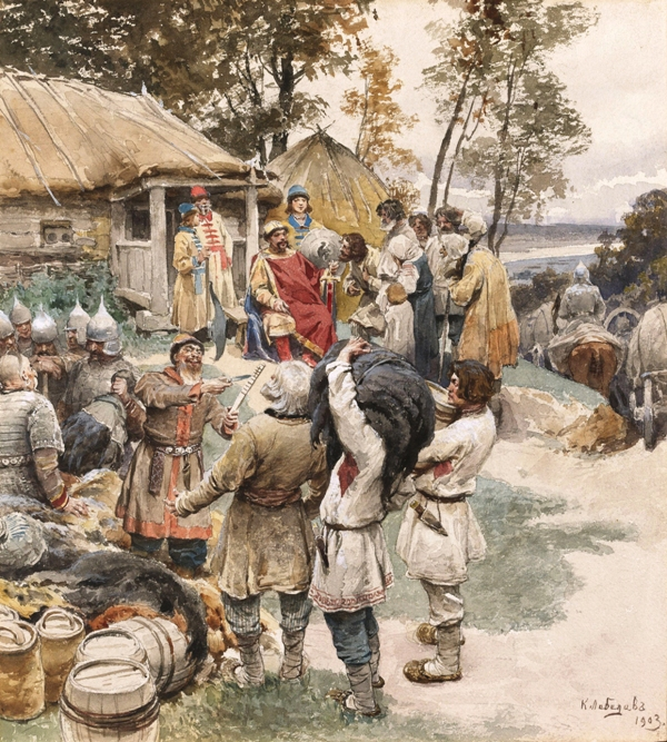 Russian knyaz Igor exacts tribute from the Drevlyans in 945. In russian: Князь Игорь собирает дань с древлян в 945 году ("Полюдье")